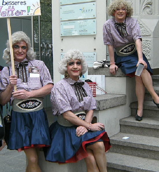 3 der O-Ton Piraten auf dem CSD Berlin 2010